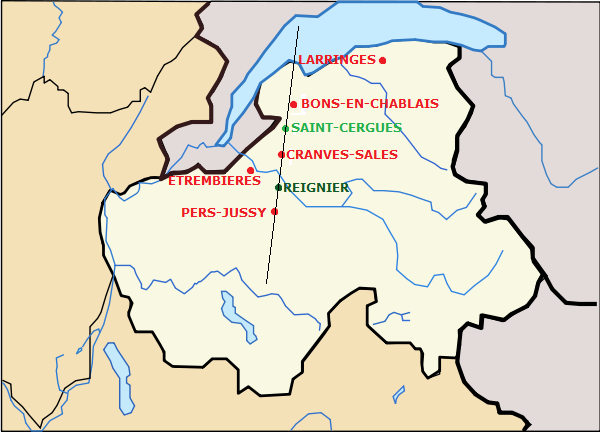 localisation des 7 dolmens savoyards